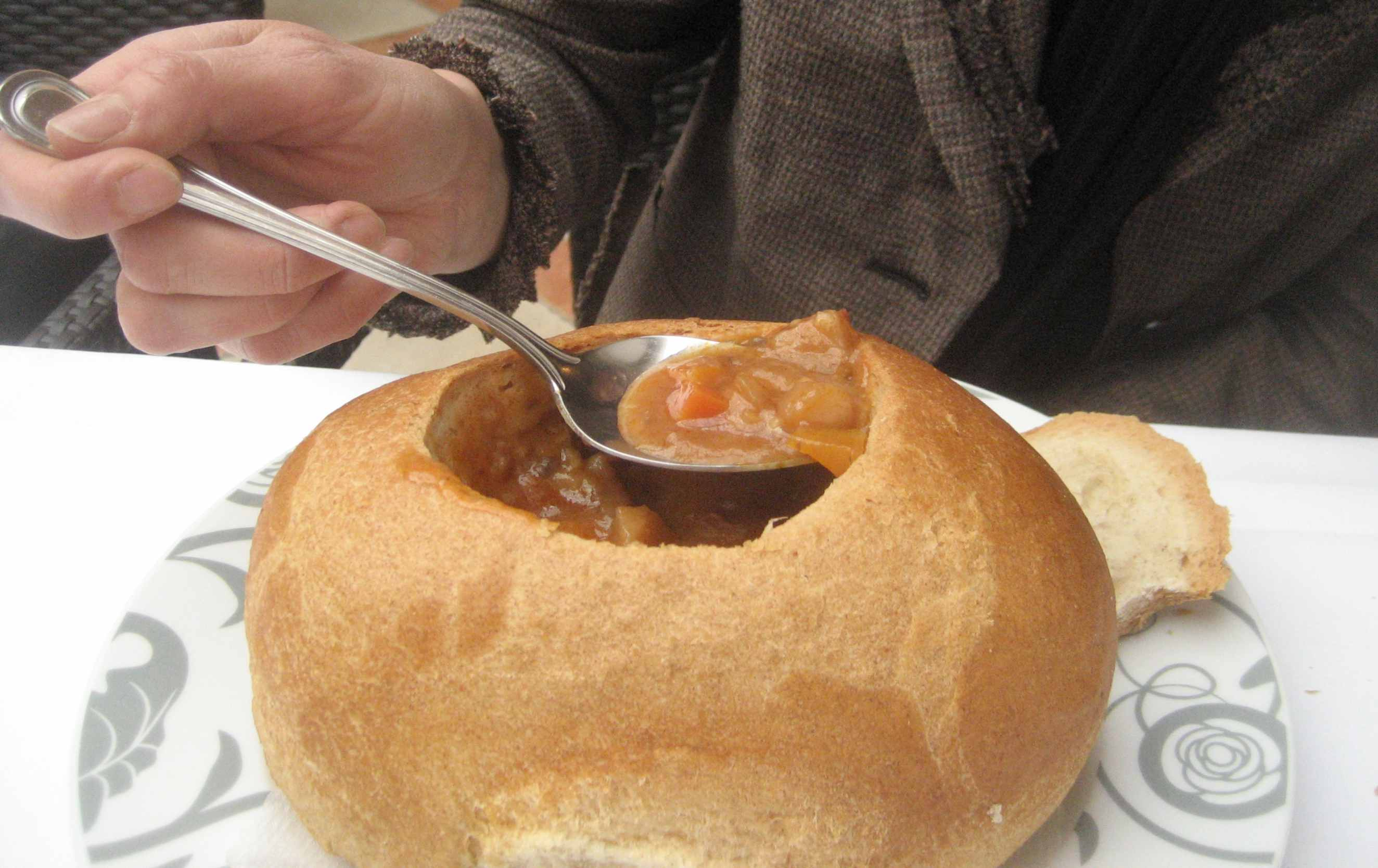 Zagorska juha u kruhu